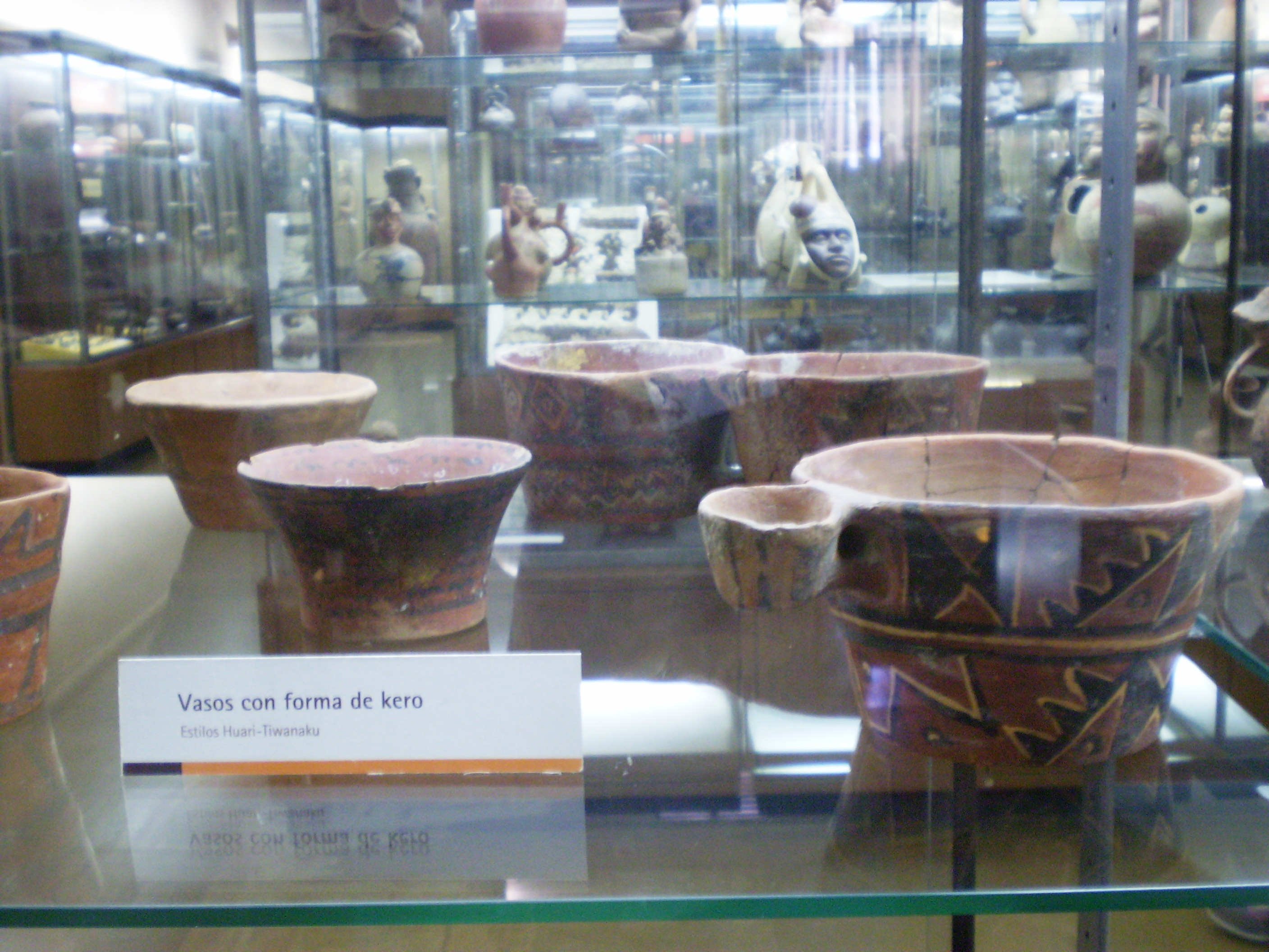 Vasos en forma de Kero.Estilo Huari - Tiawanaku. Sala de etnografía dedicada a las culturas que se desarrollaron fuera del actual territorio de la Argentina. Museo de La Plata